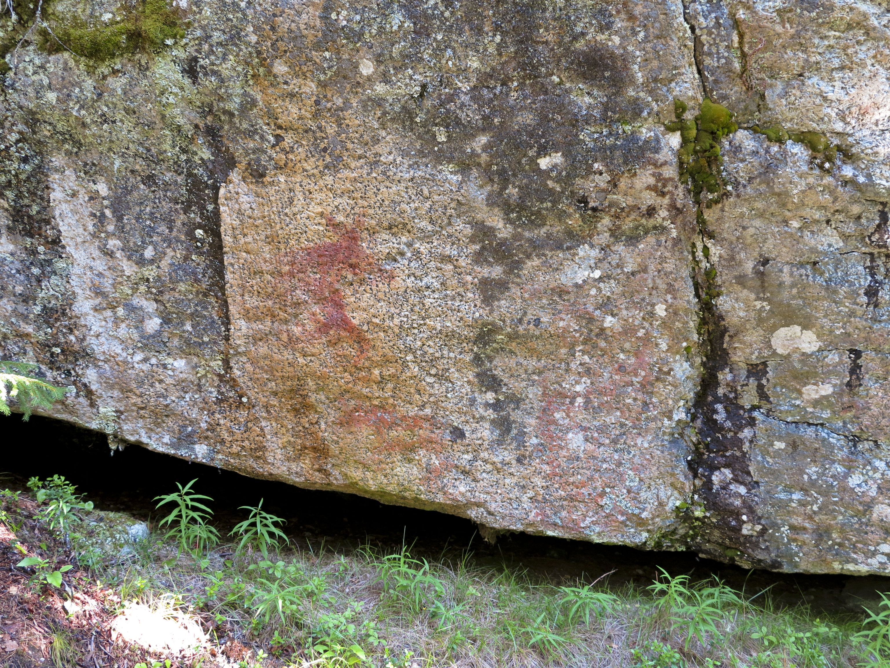 Åsele 151:1 Hällmålning, detalj